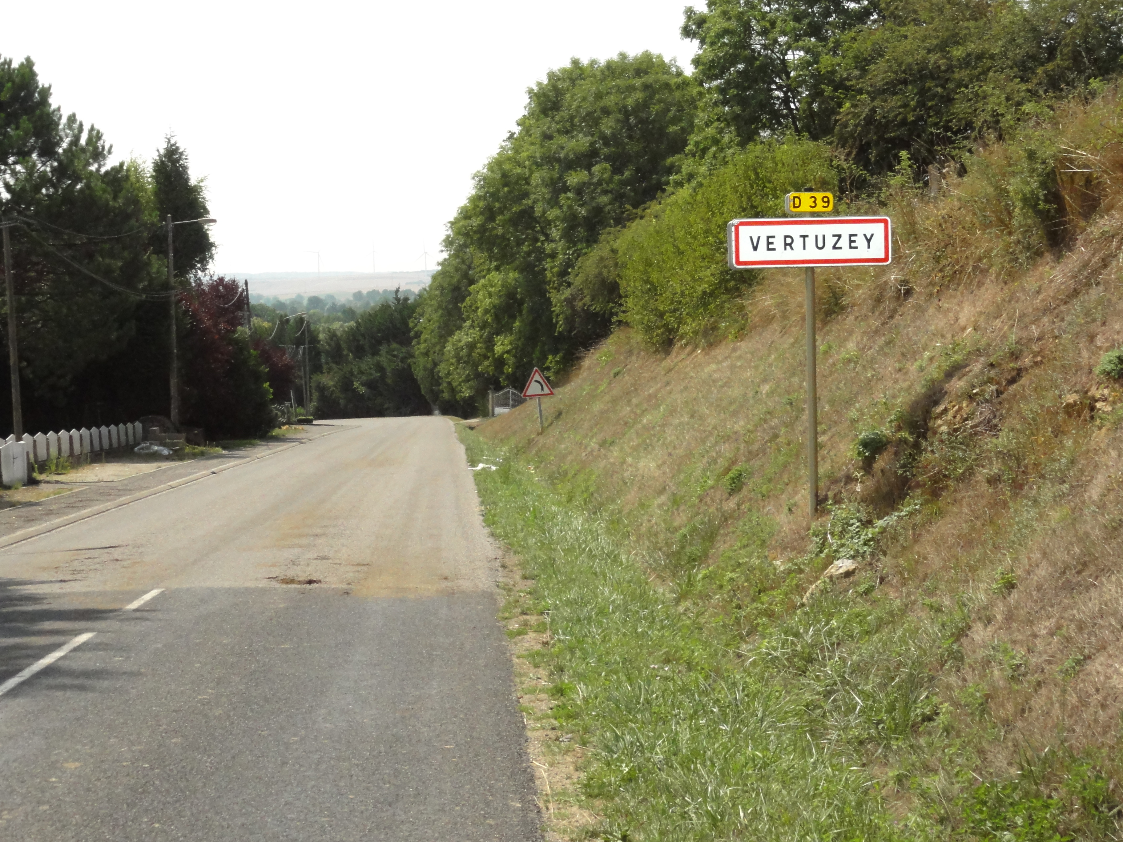 Vertuzey (Meuse) city limit sign